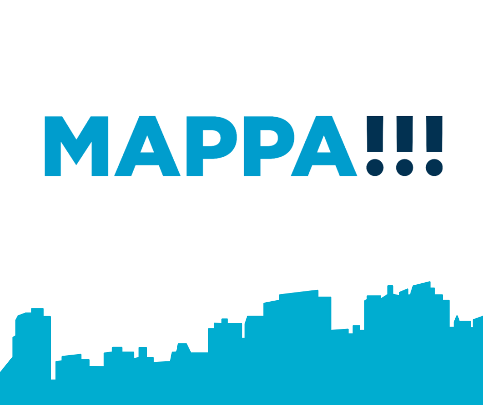 Logo Městského ateliéru prostorového plánování a architektury Ostrava